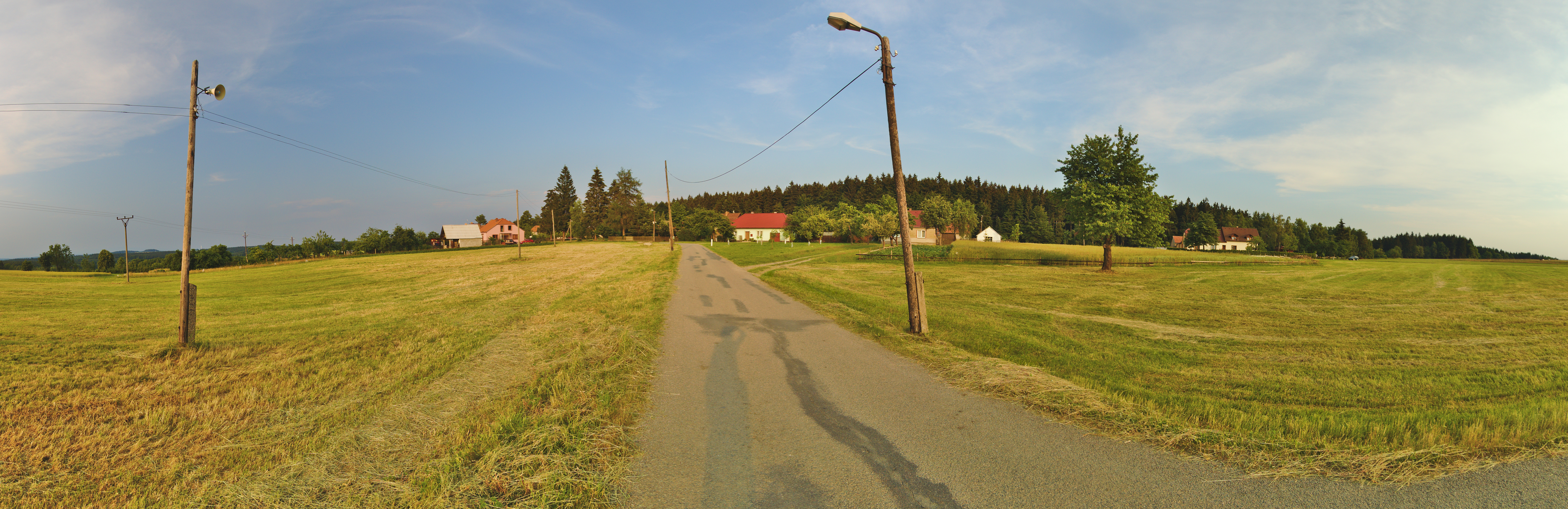 Panoramatický pohled na osadu, Pavlov, Benešov, okres Blansko